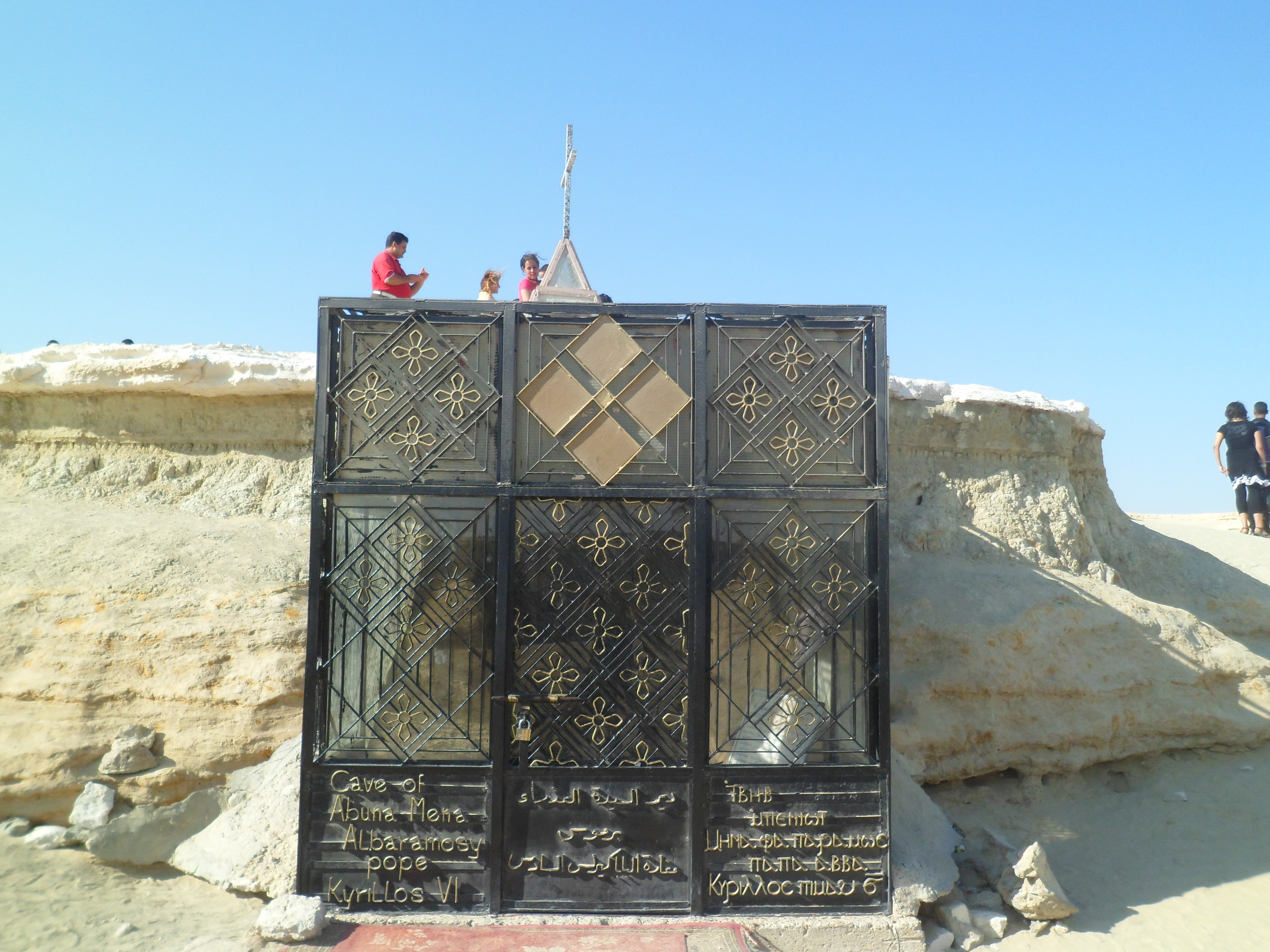 مغارة البابا كيرلس السادس بصحراء دير البراموس بوادي النطرون، مصر.